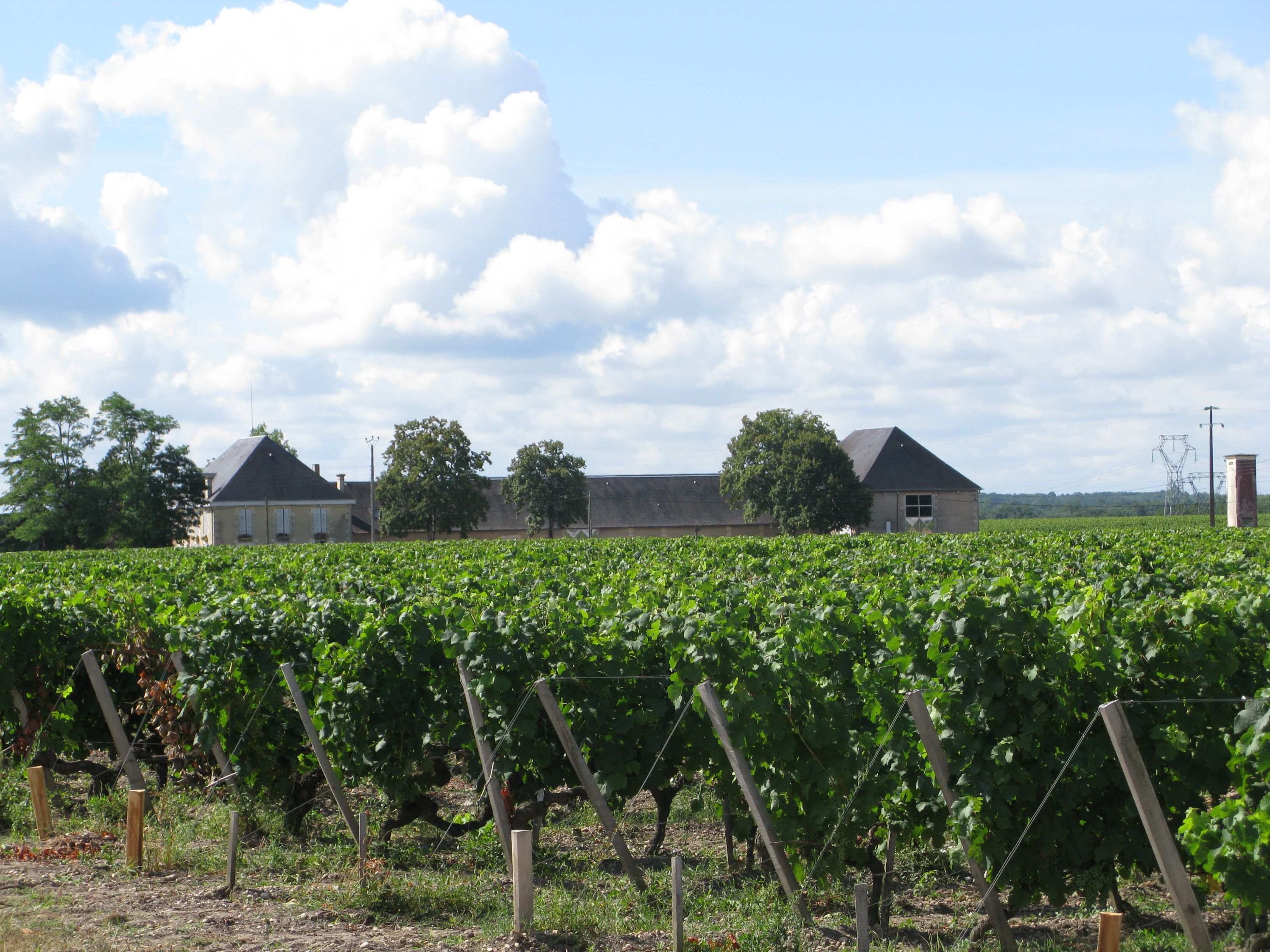 Le château Brillette, sur la commune de Moulis-en-Médoc